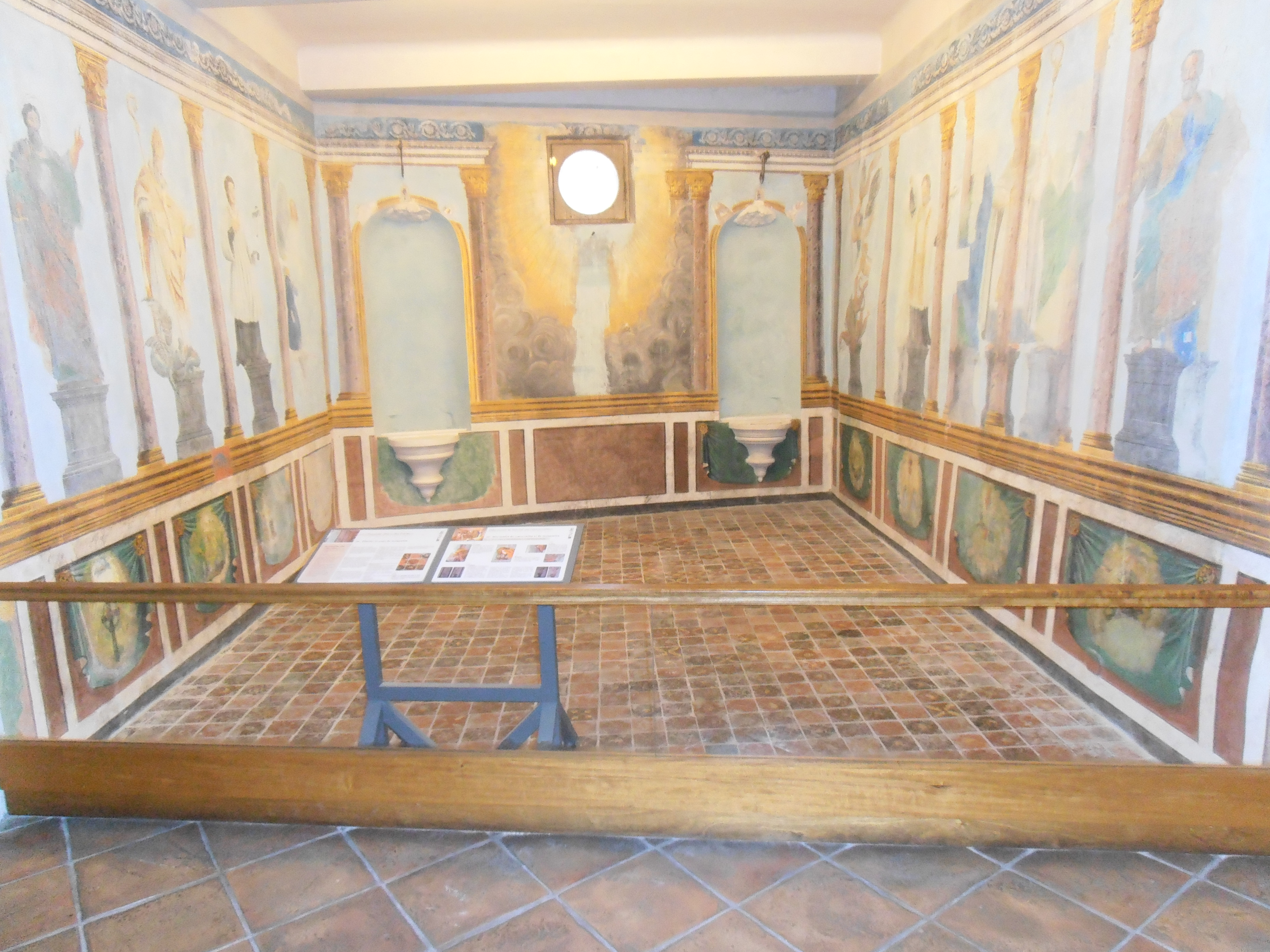 Var, Draguignan, Musée des arts et traditions de Moyenne Provence. Chapelle dite des Frères. Datation : selon les historiens, le décor aurait été peint entre 1818, date de l'achat de l'Hôtel de la Malte par la famille Escalon et 1838 date de la fondation de la congrégation dite de « Notre-Dame de Miséricorde du Bon Pasteur » par Éléonore Escalon (source : panneau signalétique de présentation de la chapelle)